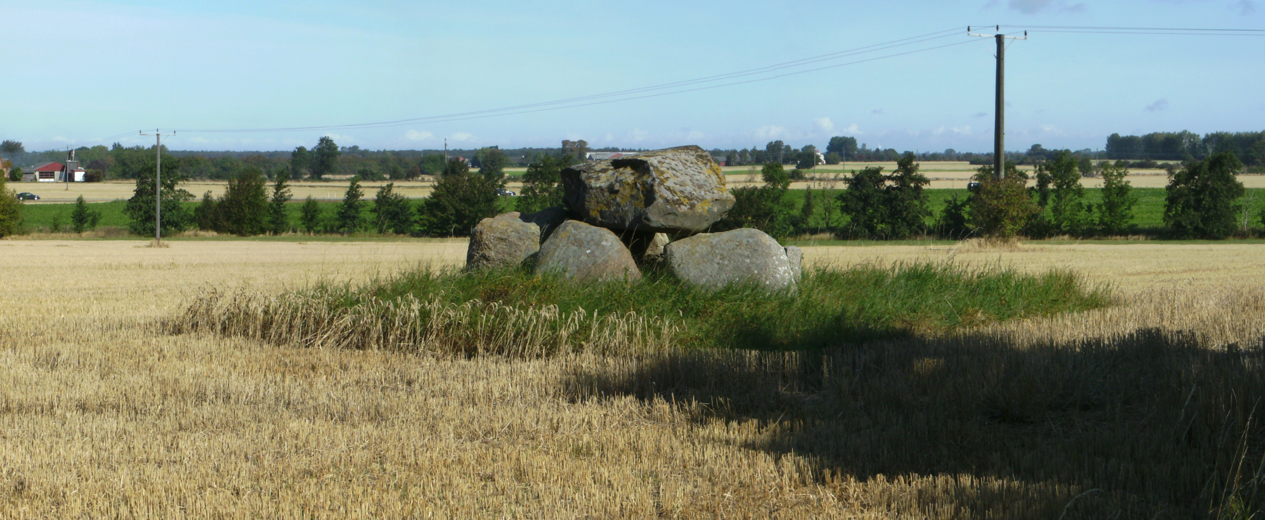 Oldtidsgrave i Kettinge Sogn nord for Nysted Dolmens in a north of Nysted, Denmark